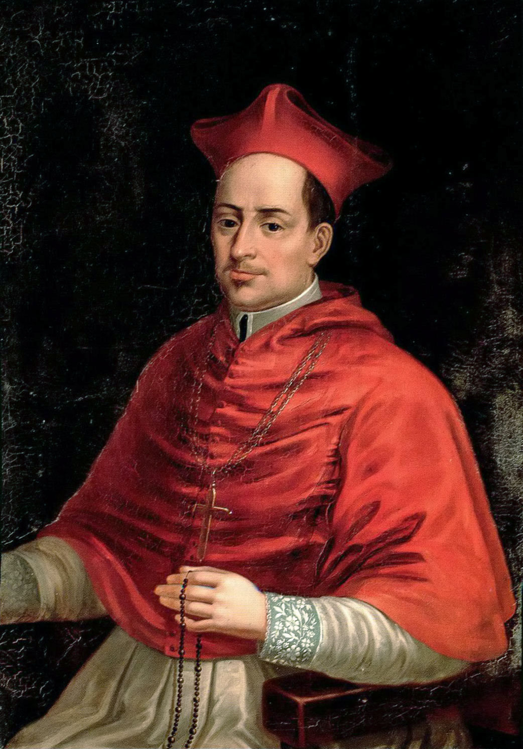 Беларуская (тарашкевіца): Партрэт Юрыя Радзівіла (Jury Radzivił)